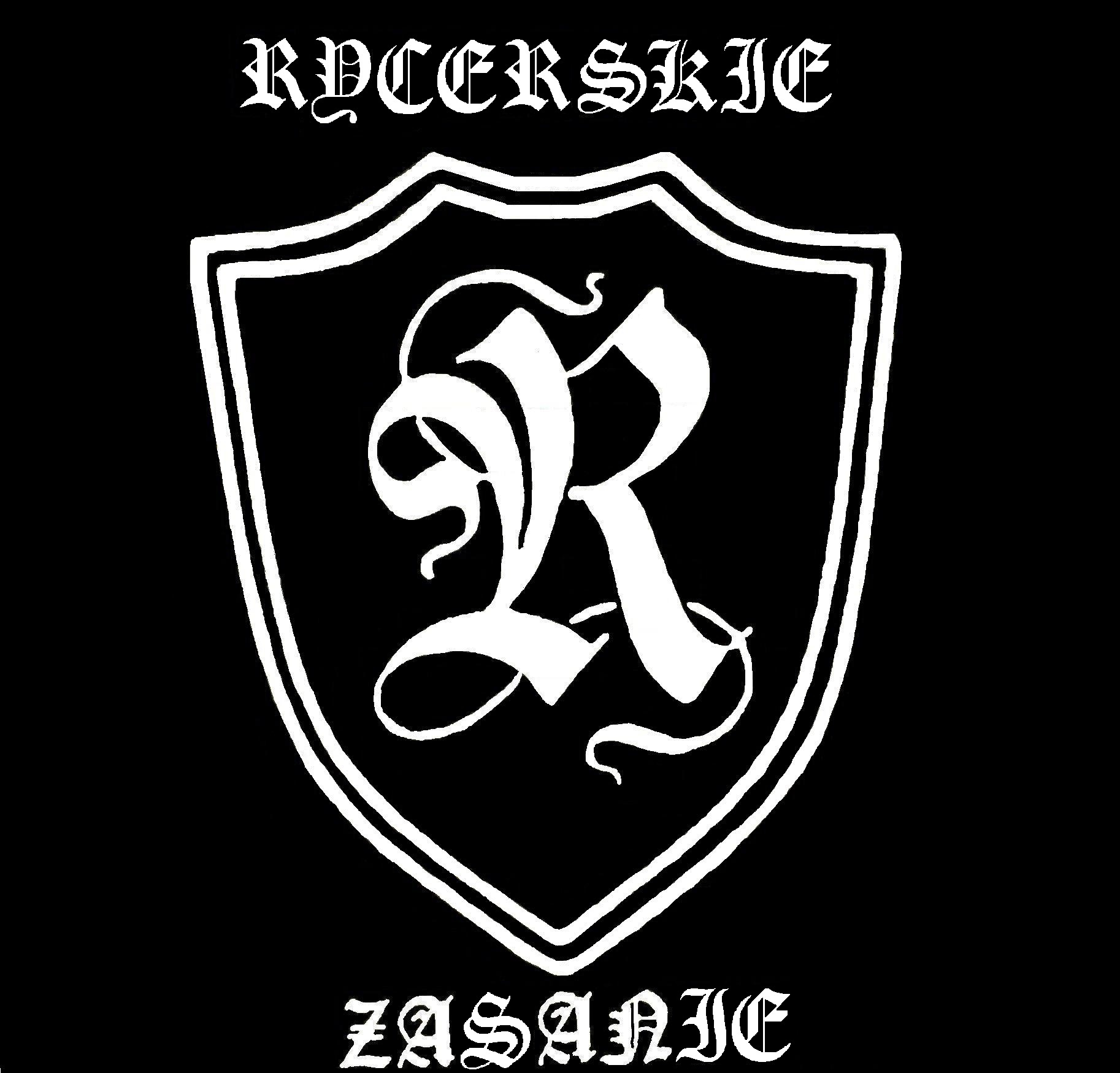 Plik przedstawia nieoficjany herb os.Rycerskie